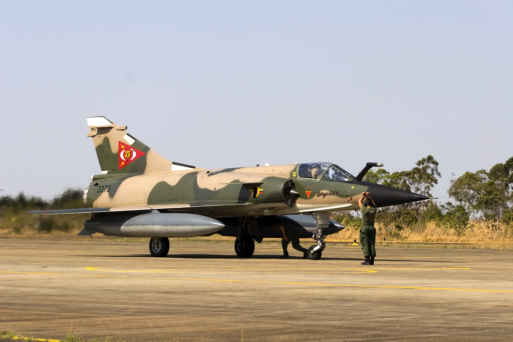 Mirage 50EV from Venezuela